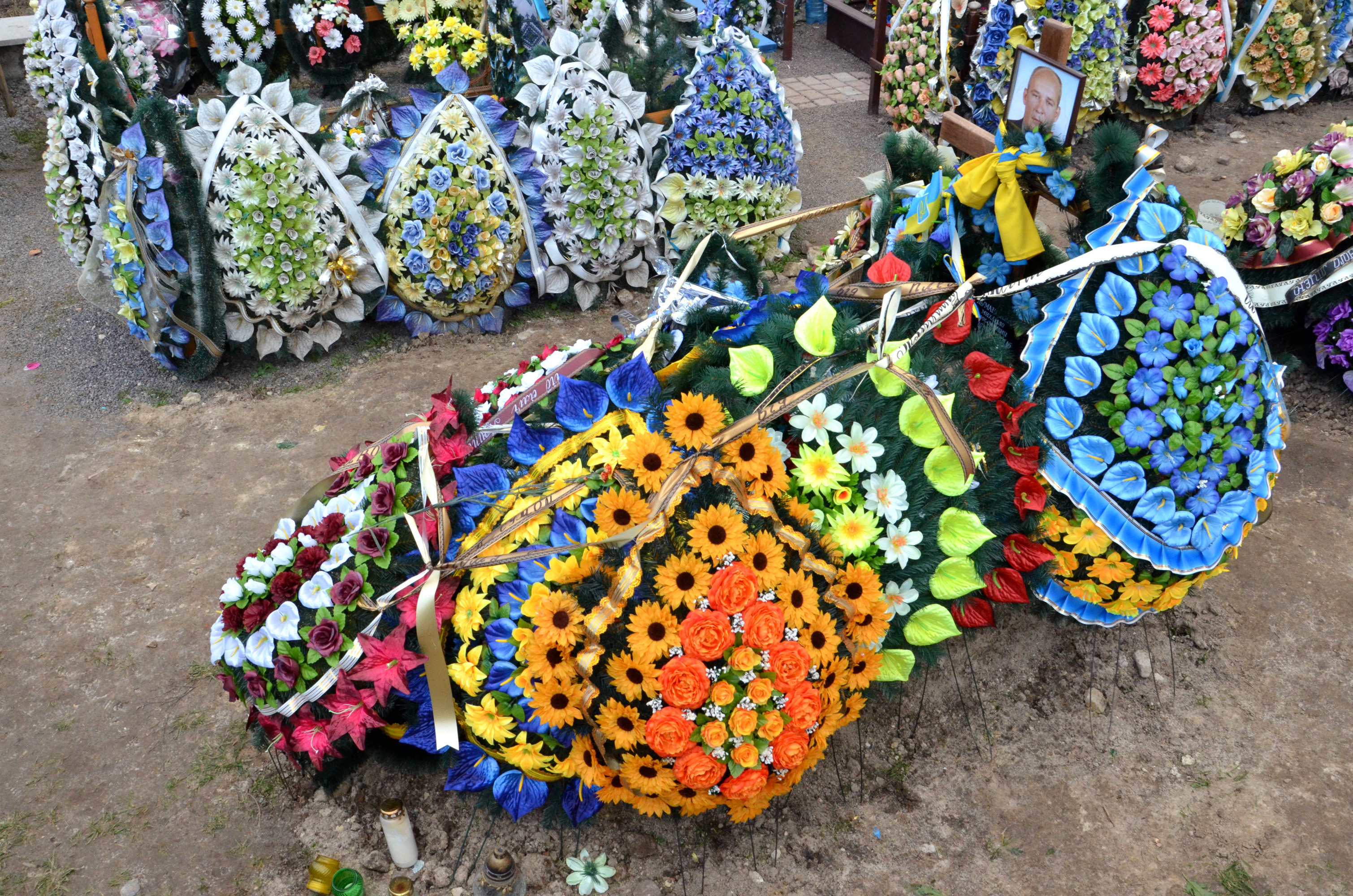 Могила українського військовика, стрільця-зенітника 81-ї десантно-штурмової бригади (Дружківка) Михайла Думанського на Алеї Героїв російсько-української війни 2014–2019 рр. на Микулинецькому цвинтарі в Тернополі.